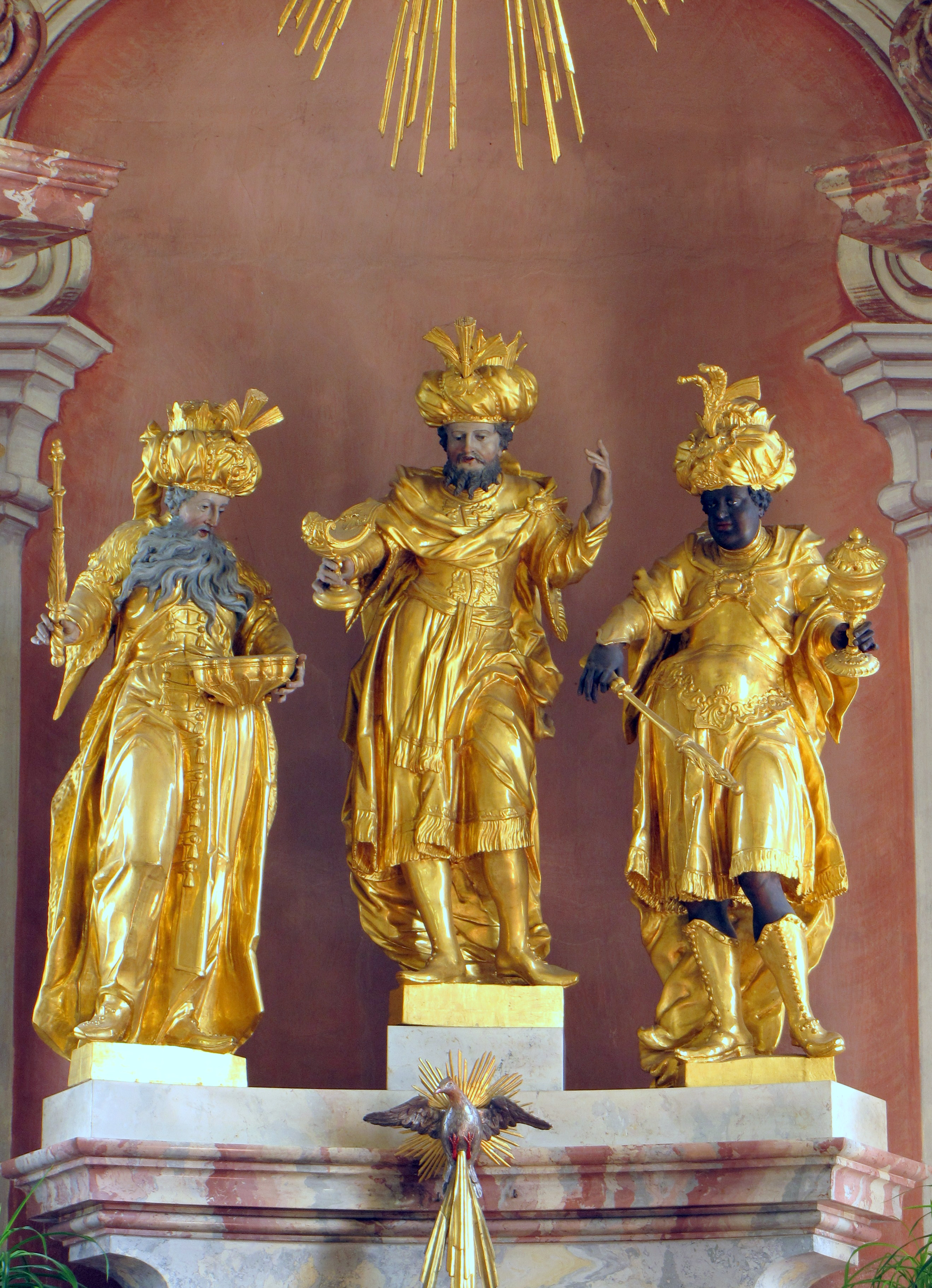 Hll. Drei Könige von Joseph Georg Witwer in der Pfarrkirche von Elmen (Tirol)